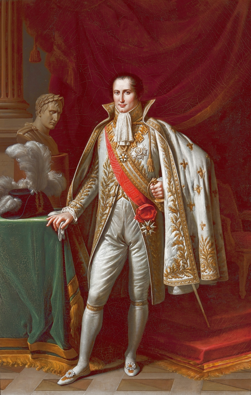 Ritratto di Giuseppe Bonaparte (1768-1844)